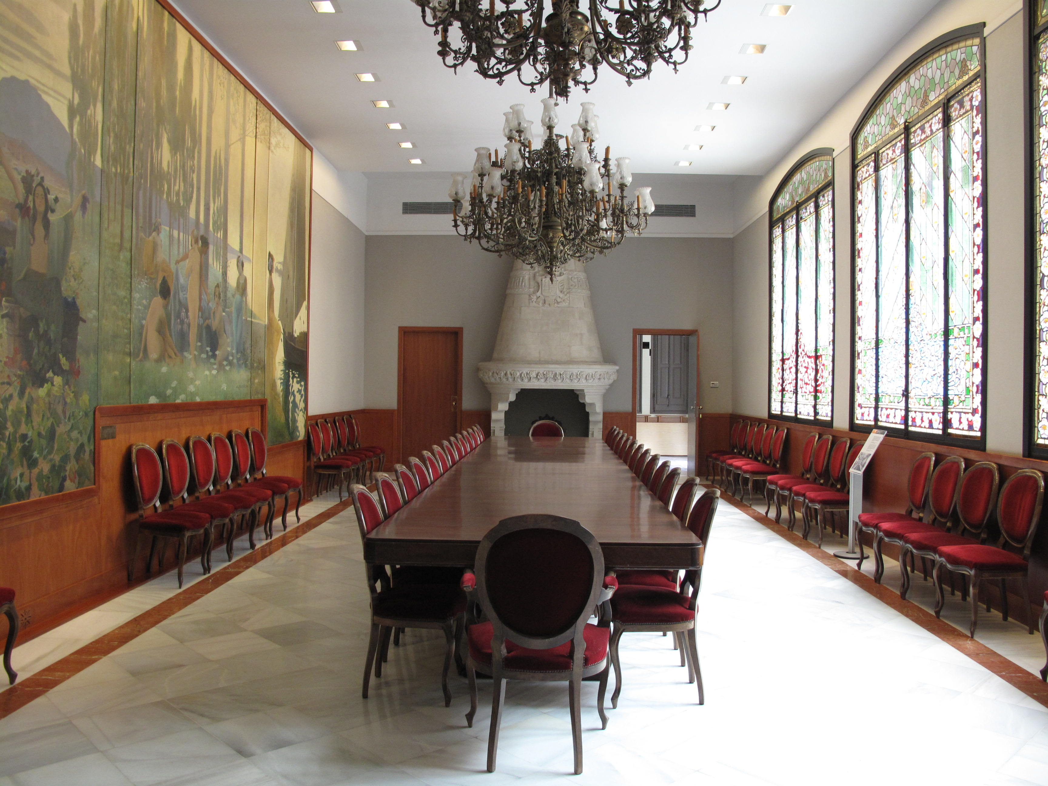 Casa Alegre de Sagrera (Terrassa), menjador amb vitralls modernistes i plafó ornamental d'Alexandre de Riquer